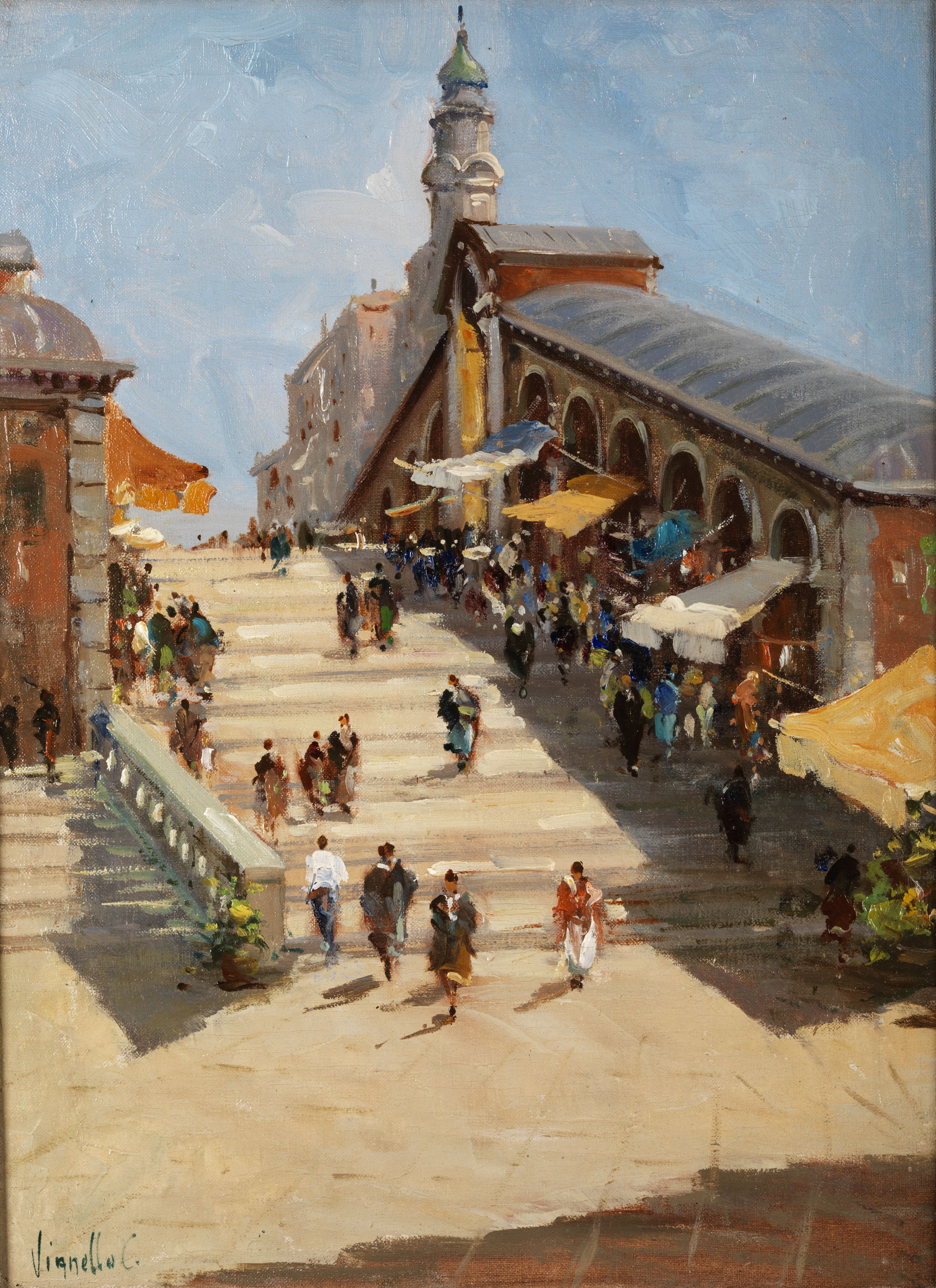 Die Rialtobrücke in Venedig. Öl auf Leinwand. 30,5 x 40,5 cm. Links unten signiert.